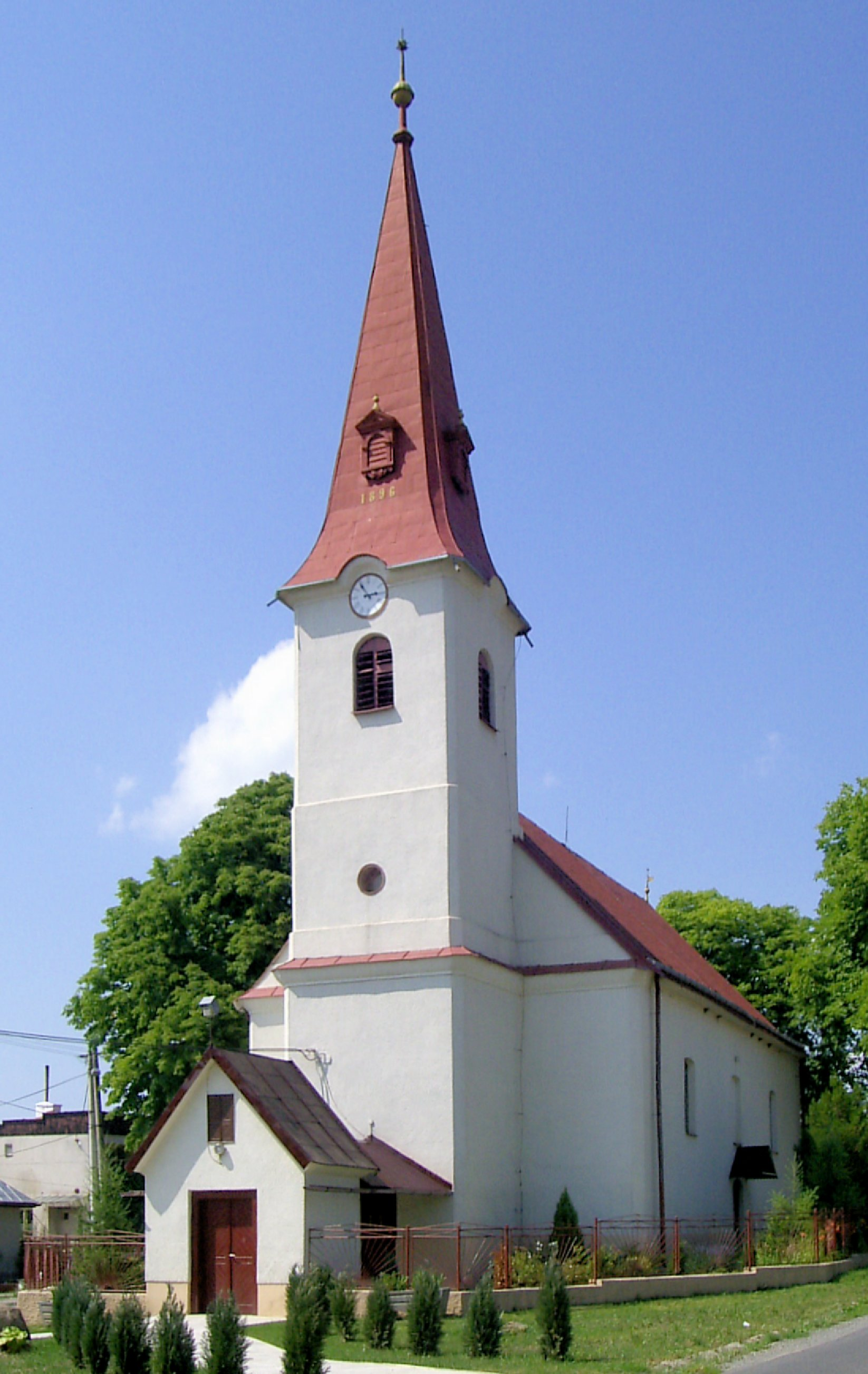 A református templom, Magyarbőd